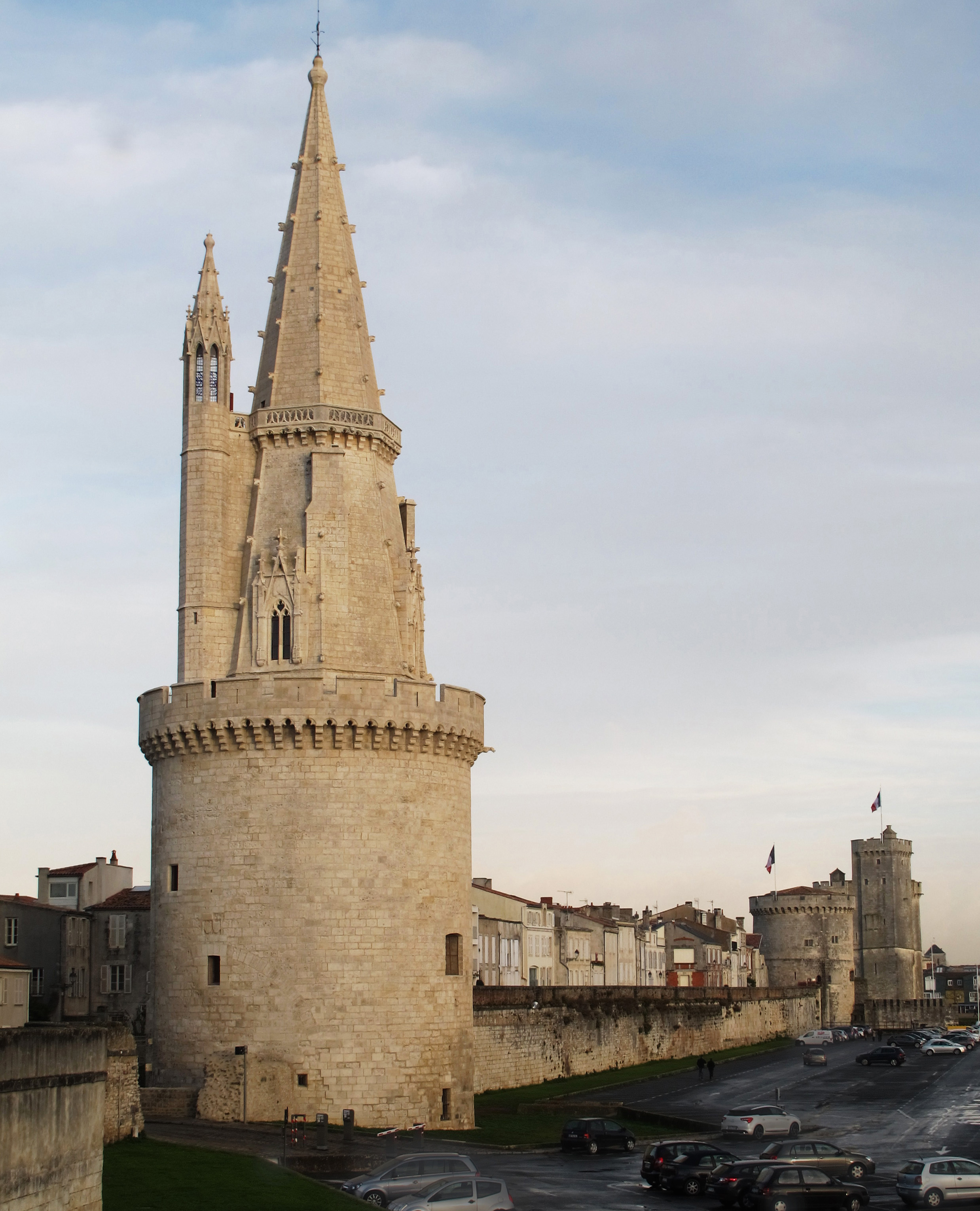 Au premier plan, la Tour de la Lanterne, La Rochelle, France